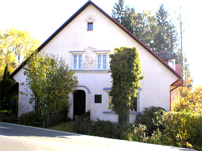 Pěčín, okres Rychnov nad Kněžnou. Dům, v němž žil a tvořil akademický sochař Leoš Kubíček (1887 - 1974).